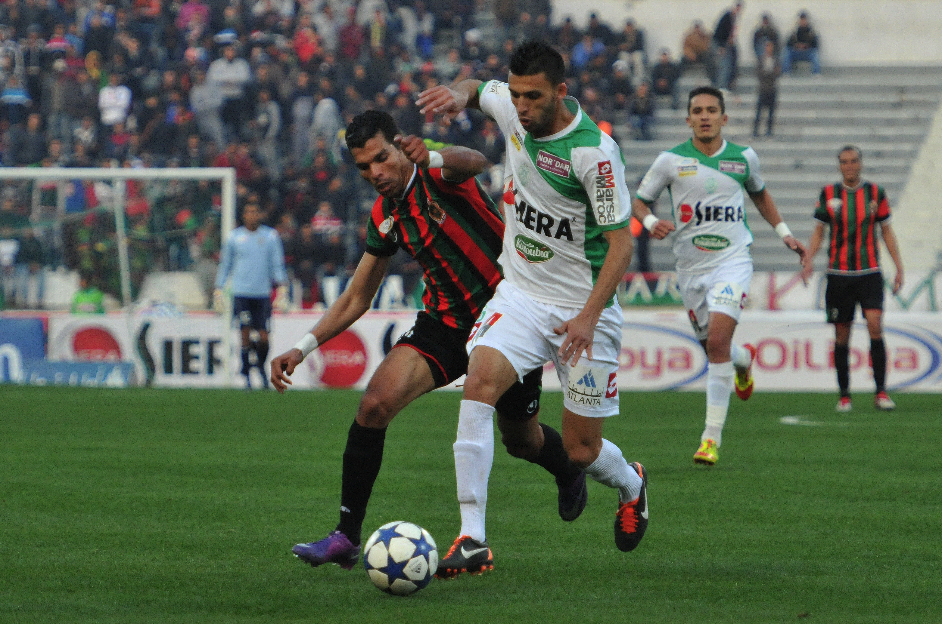 RCA vs FAR